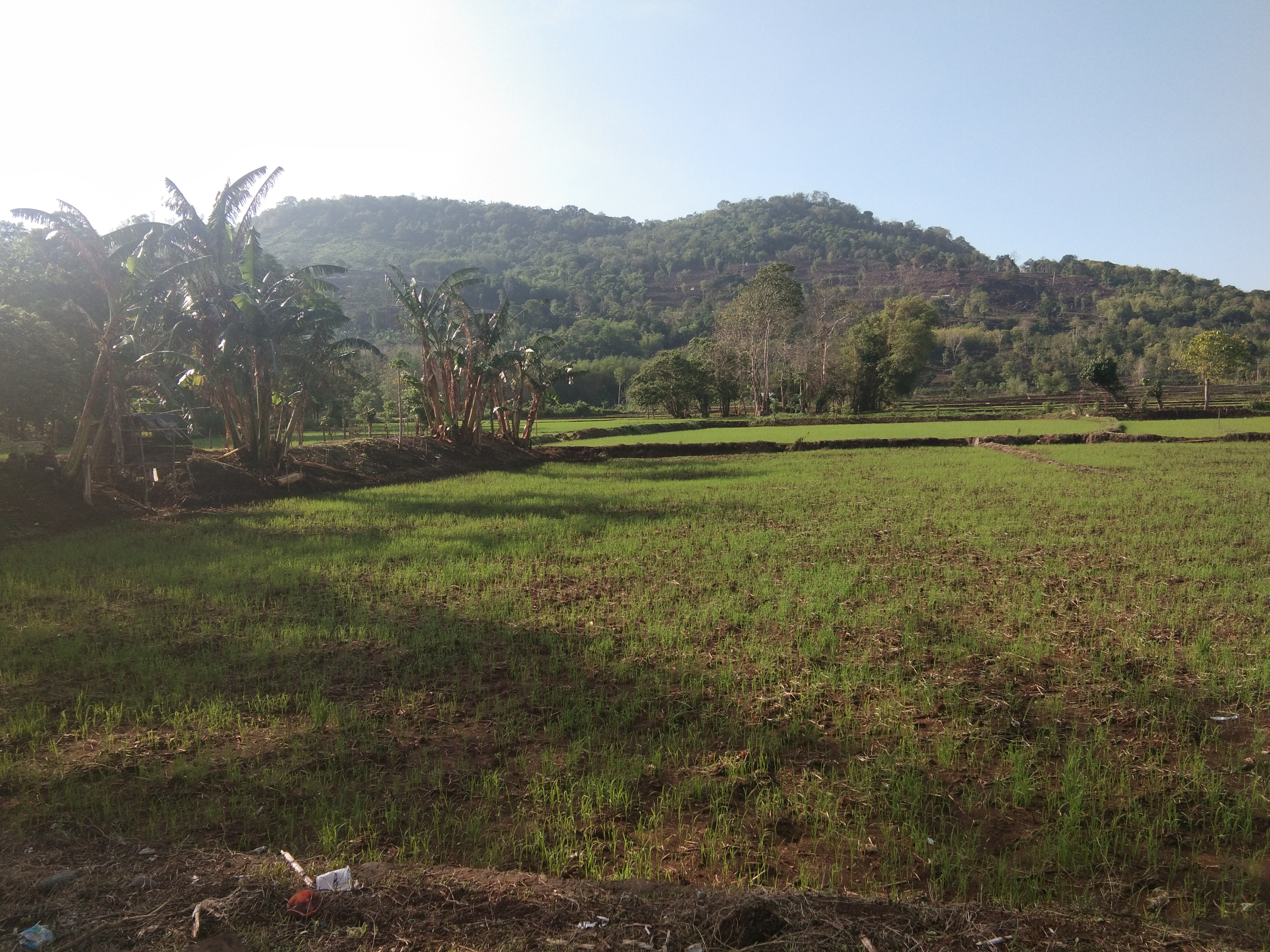 Gunung Bollangi terletak di Kecamatan Pattallassang Kabupaten Gowa. Masyarakat yang tinggal di gunung tersebut adalah Suku Bugis yang berasal dari Bone.